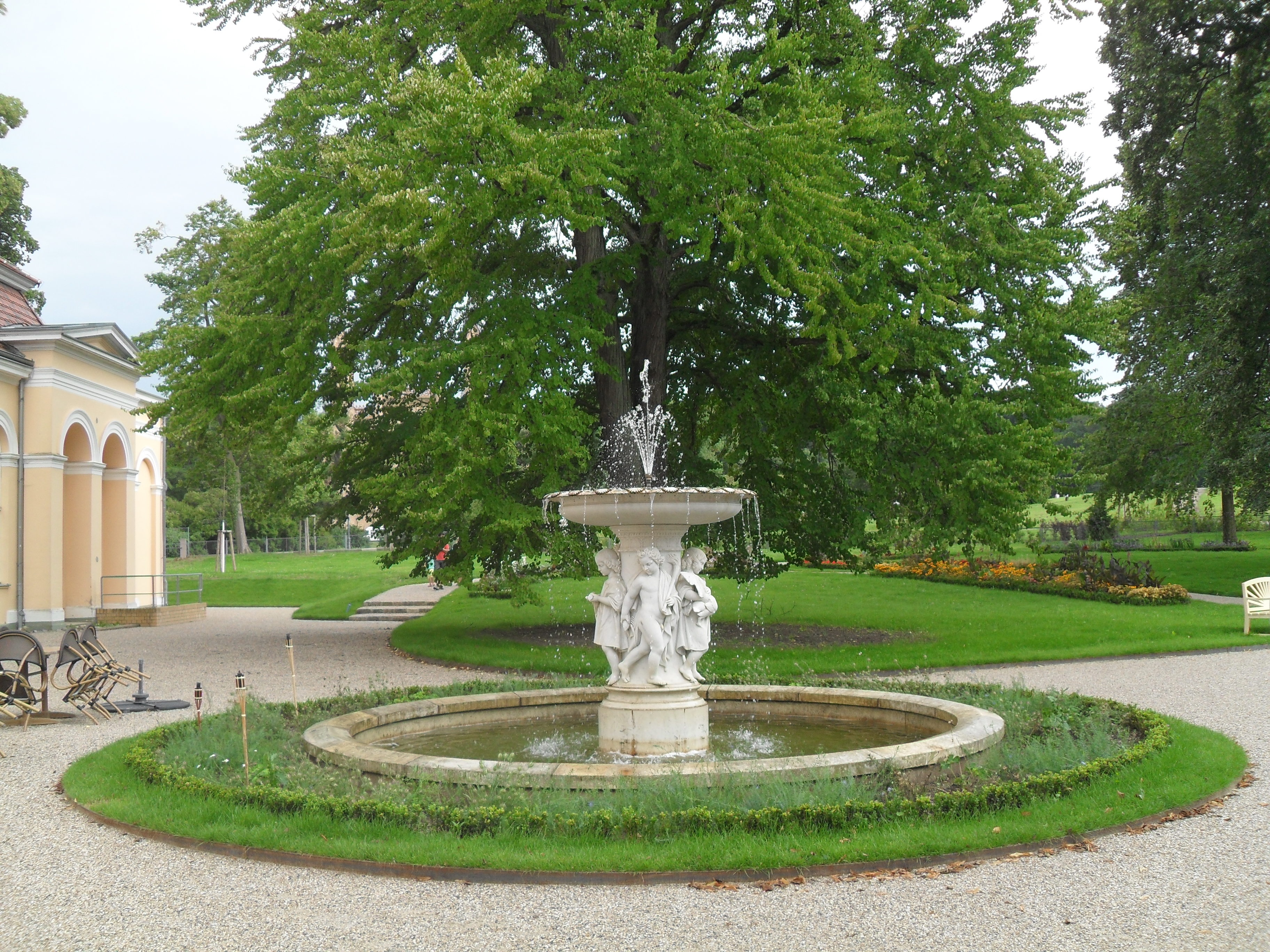 Der 1844 von Albert Wolff nach einem Entwurf von Eduard Stützel gefertigte und als Kinderbrunnen bezeichnete Springbrunnen stand zunächst im Park Sanssouci, kam aber dann als Geschenk des preußischen Königs Friedrich Wilhelm IV. an seinen Onkel Großherzog Georg nach Neustrelitz und wurde dort vor der Orangerie aufgestellt. (Quelle: Gerlinde Kienitz: Schlosspark Neustrelitz. Hrsg. Museum der Stadt Neustrelitz, S. 15)